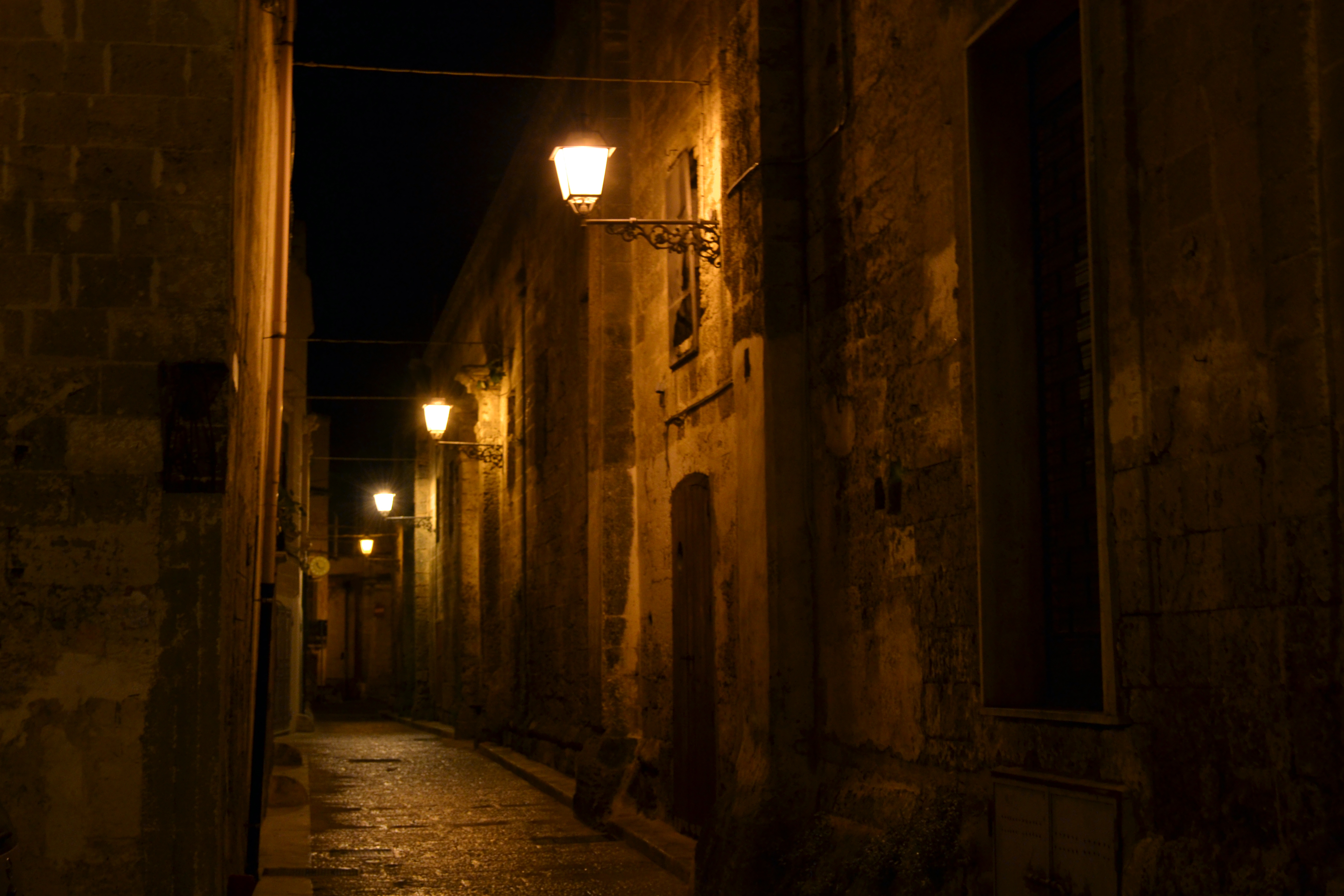 scorcio dello splendido centro storico